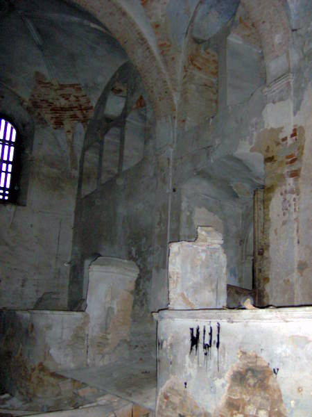 בית הכנסת בhe:פשיסחא, פולין.